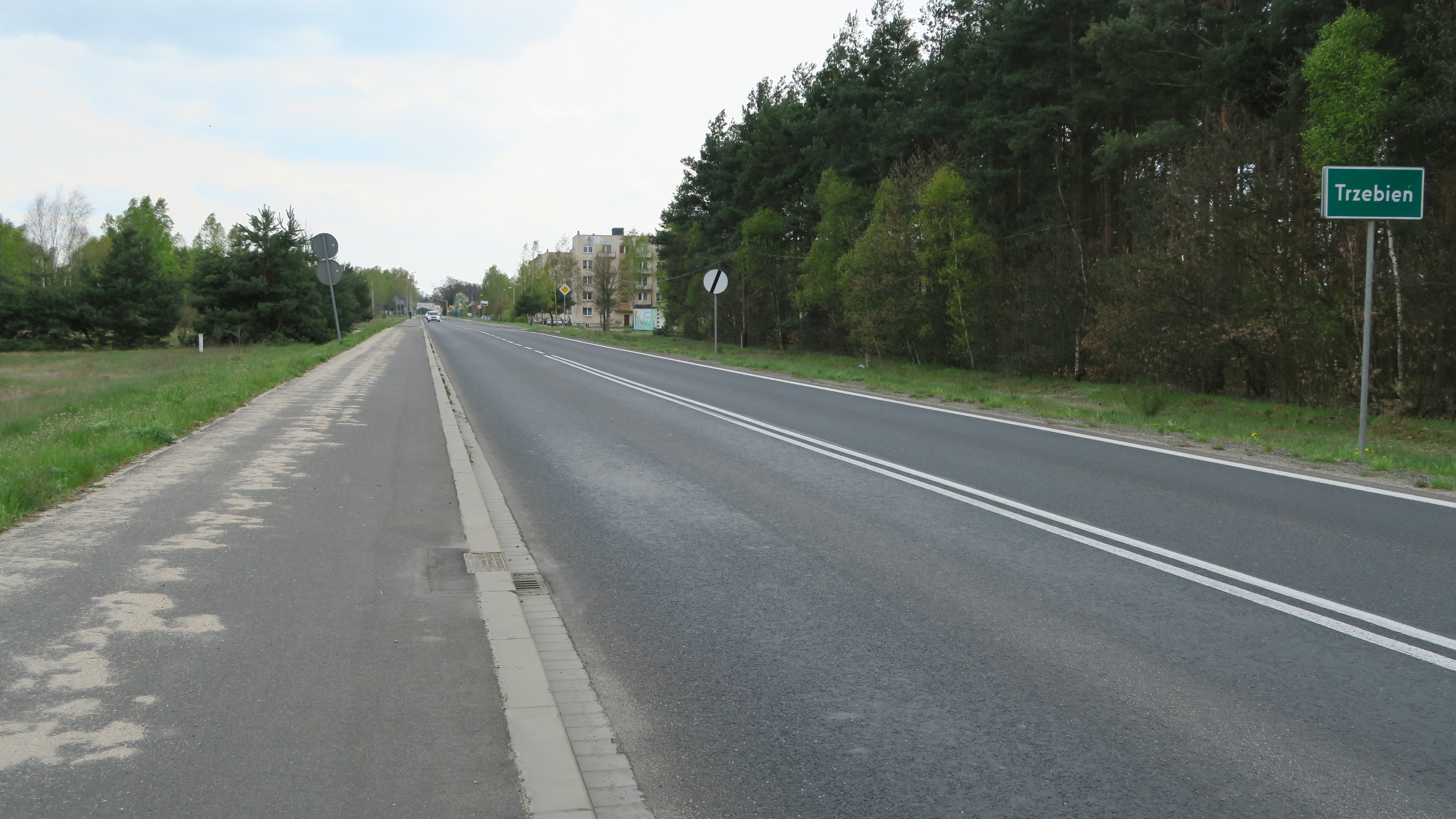 Trzebień - wjazd od strony Nowej Soli